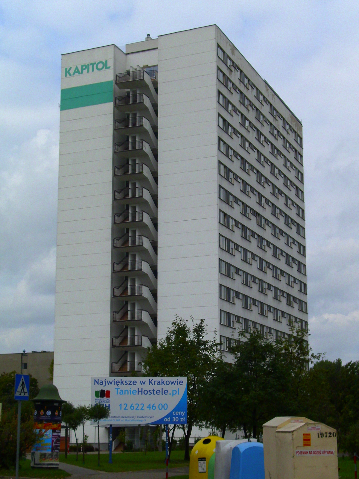 Dom Studencki "Kapitol", Miasteczko Studenckie AGH w Krakowie